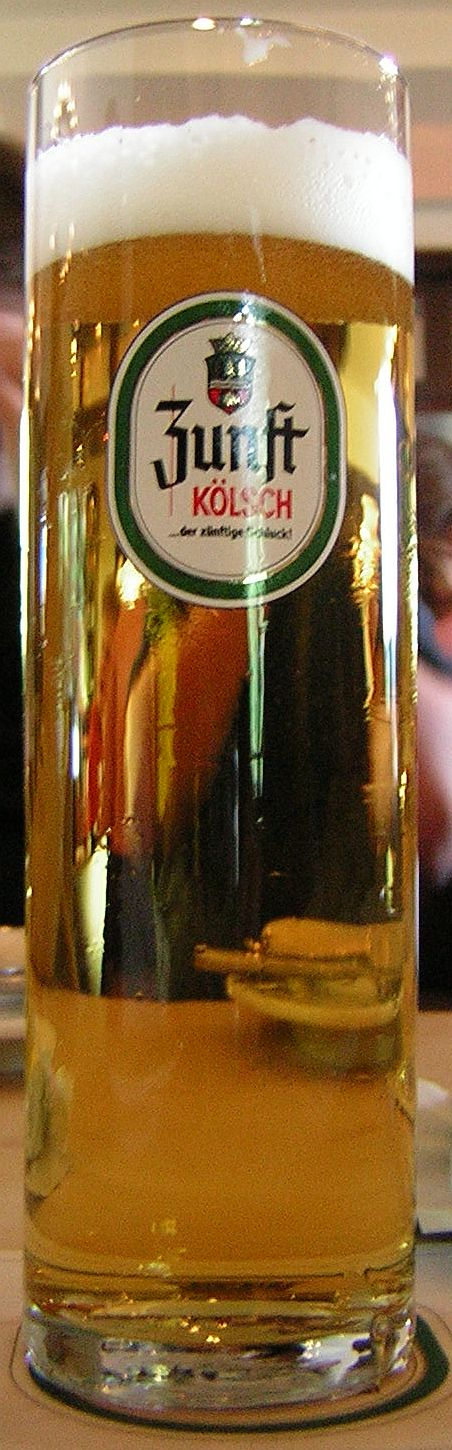 Beschreibung: Kölsch (Bier) von der Erzquell Brauerei * Fotograf: Trexer, User:Trexer * Aufgenommen: 2006 mit Nikon Coolpix 2200